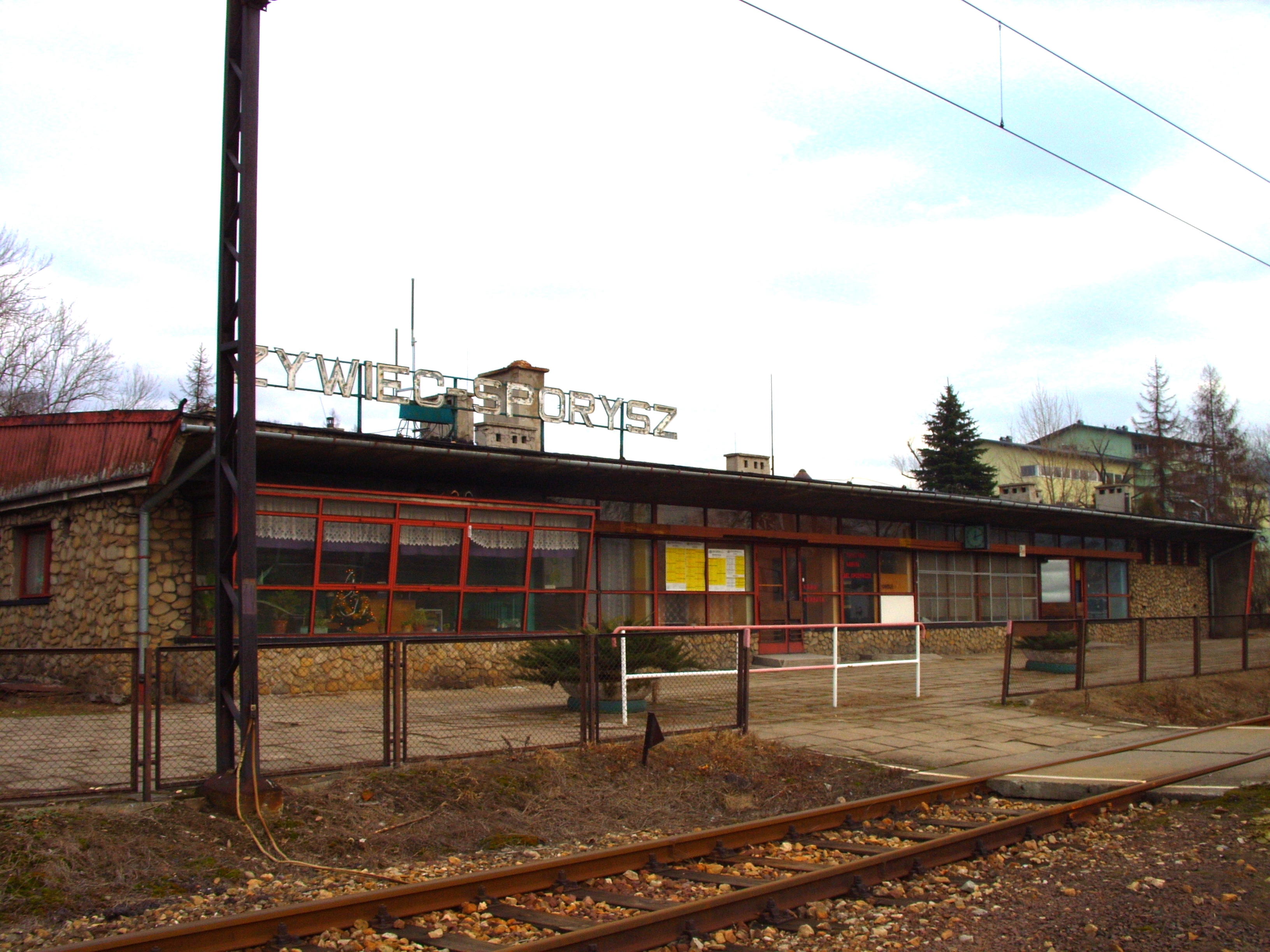 Železniční stanice Żywiec-Sporysz